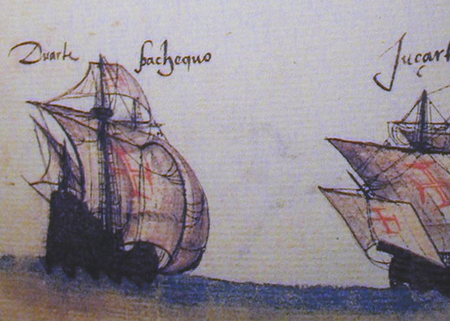 La nef Conceição que commandait Duarte Pacheco en 1503